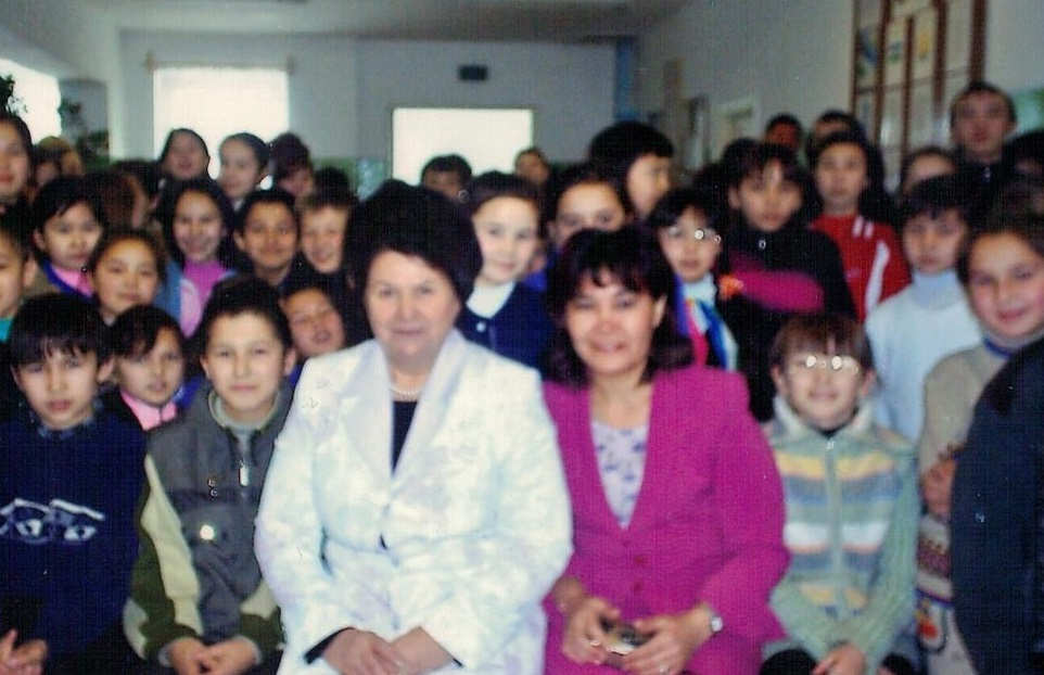 Встреча поэтессы Г. Ситдыковой с юными односельчанами в Зуяковской школе